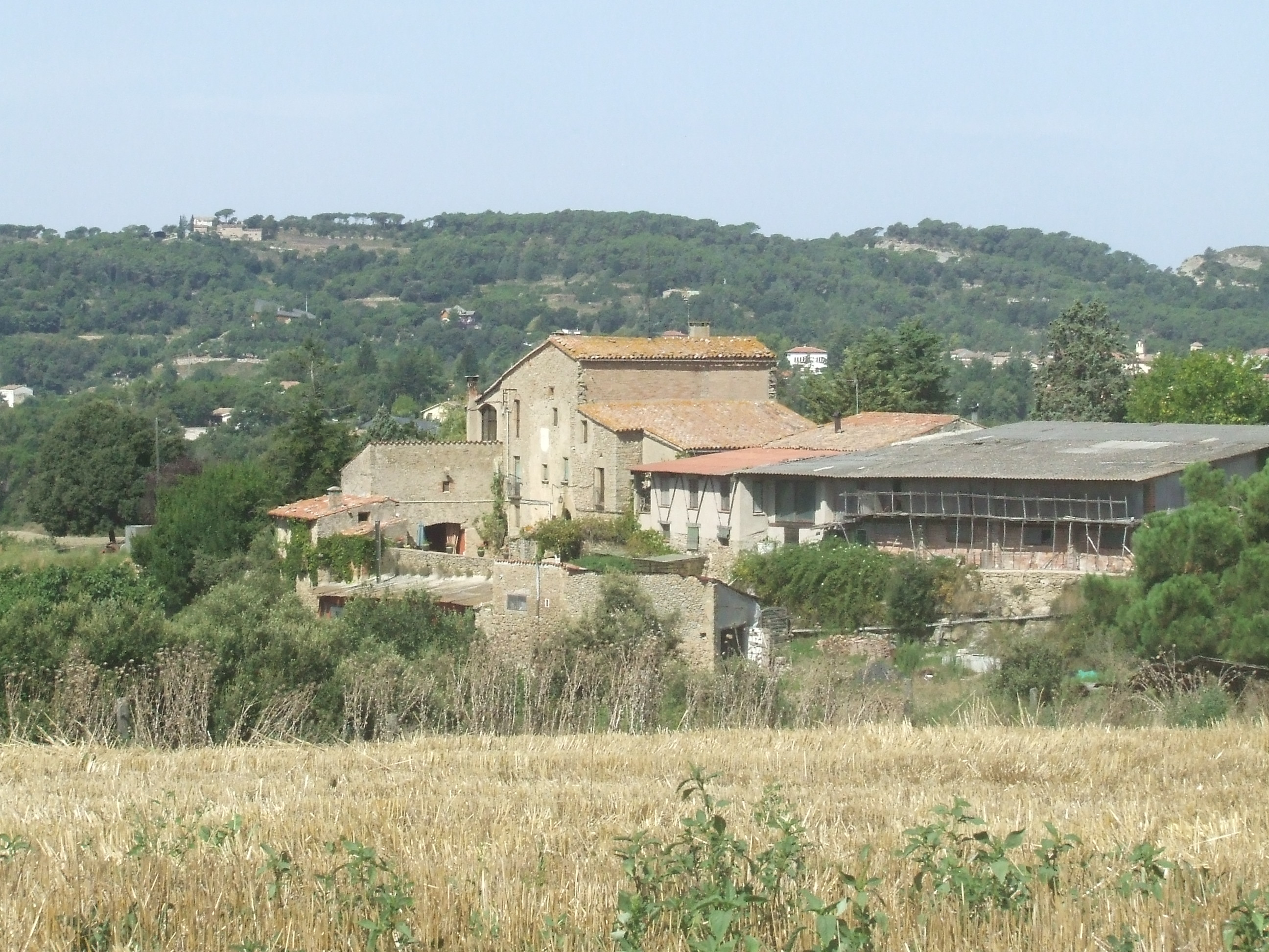 La masia de Brugueroles (Castellterçol, Moianès)